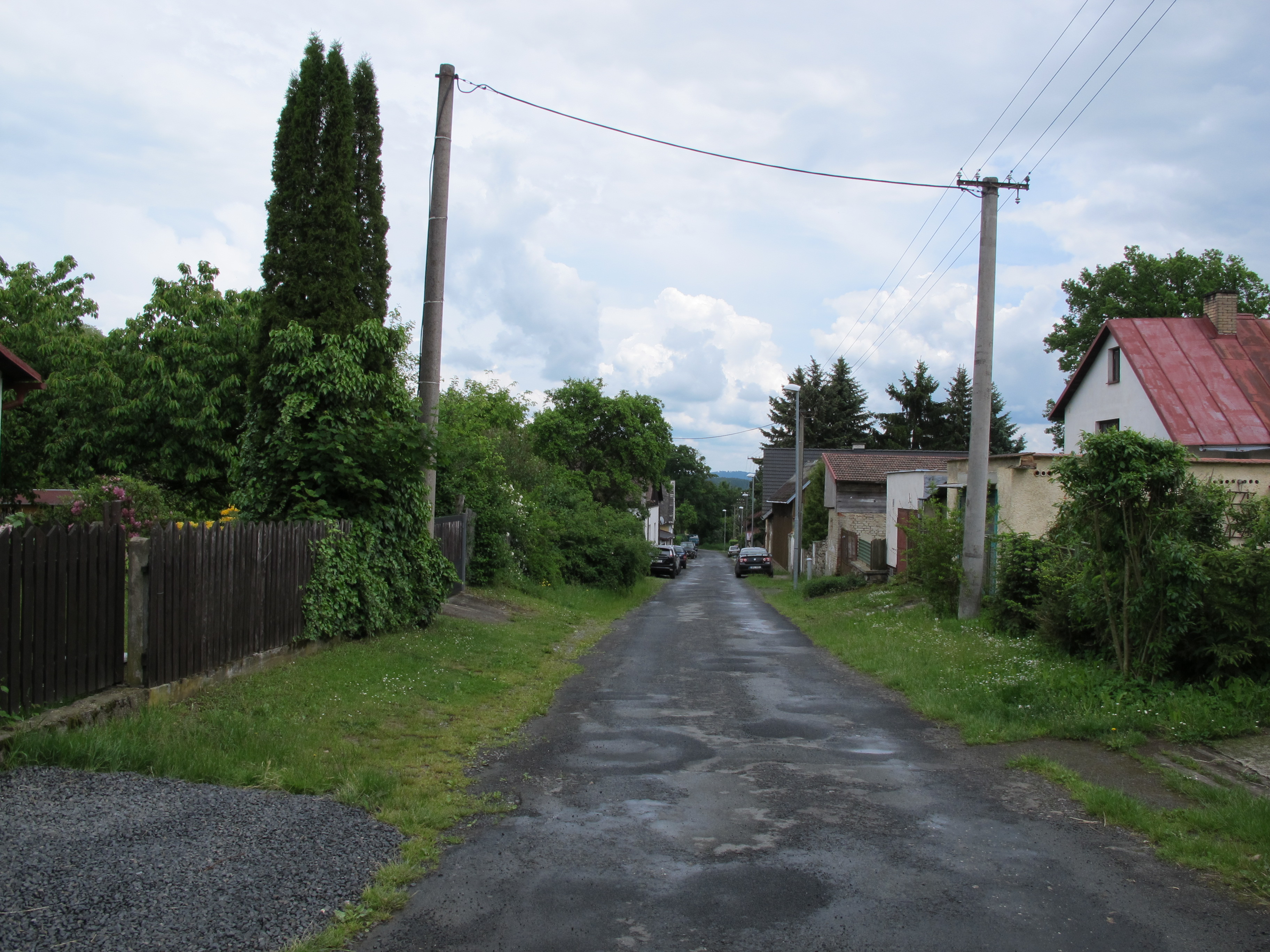 Malá Hleďsebe, okres Cheb - průjezdní silnice. This image was acquired during the event Wikiměsto Mariánské Lázně.